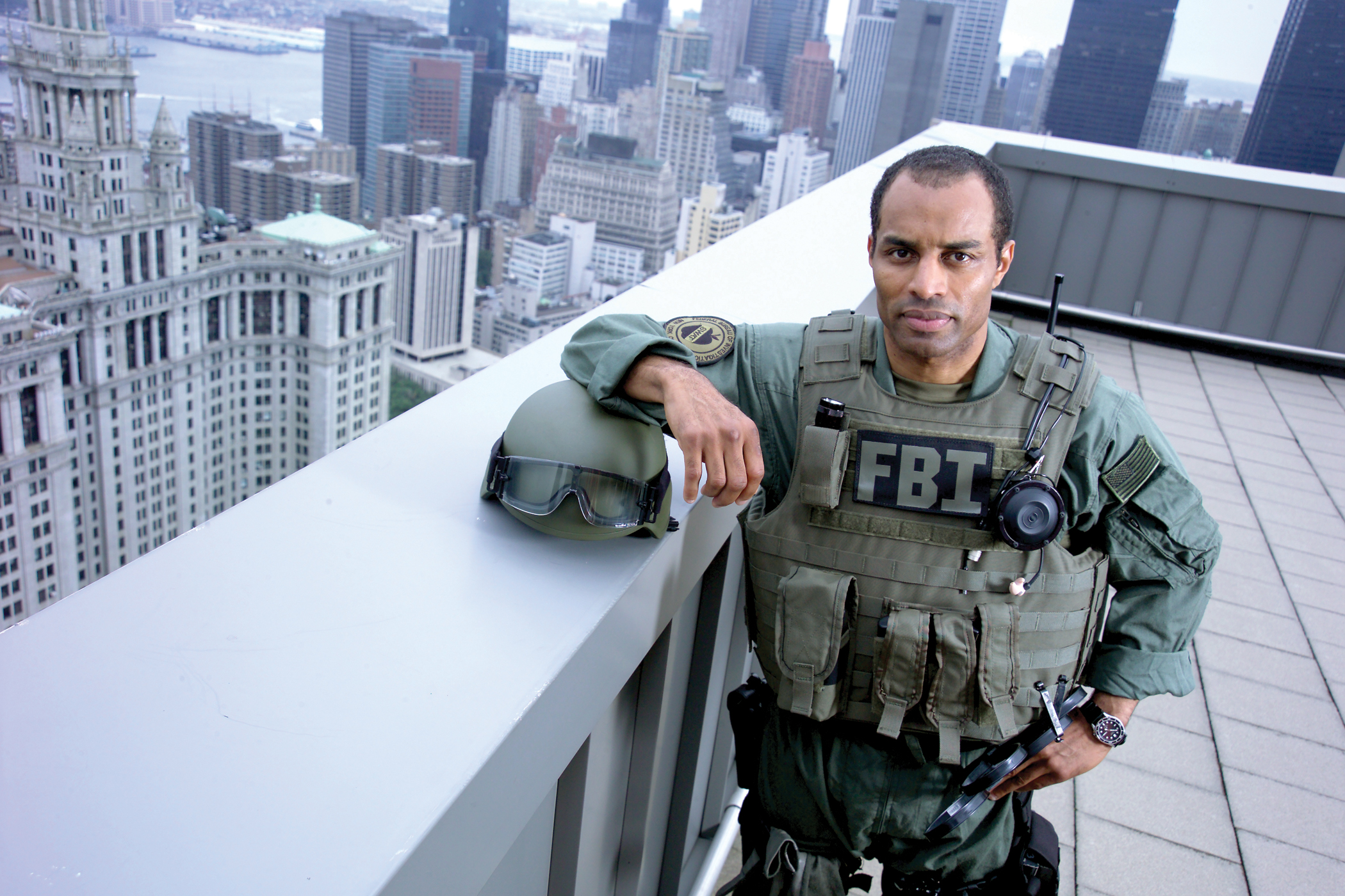 FBI SWAT agent